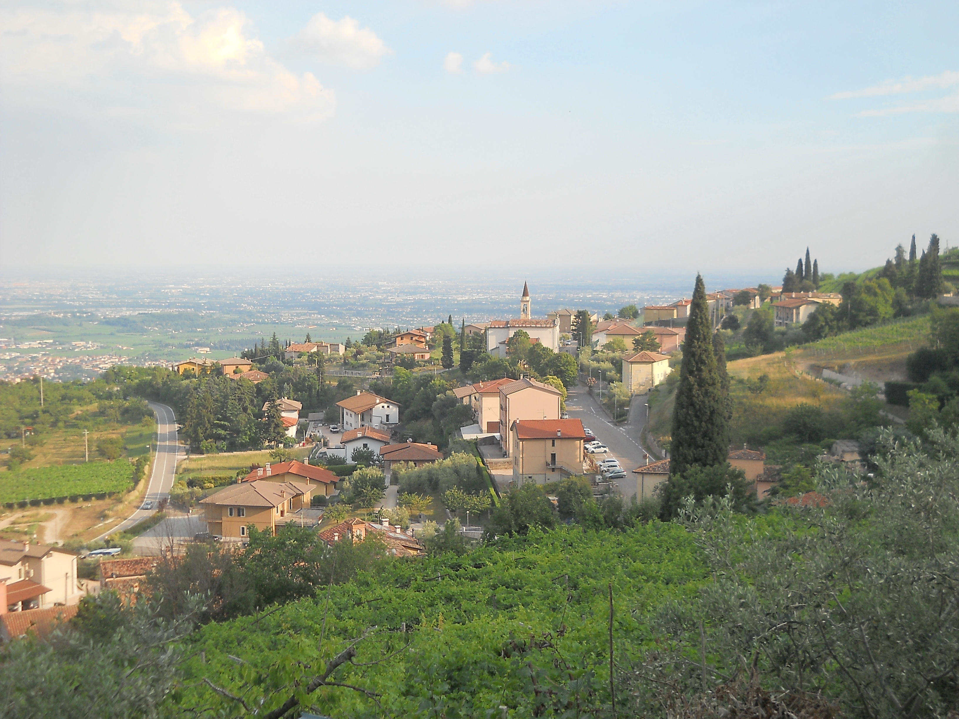 Panorama dell'abitato di Mazzurega, frazione del comune di Fumane in provincia di Verona